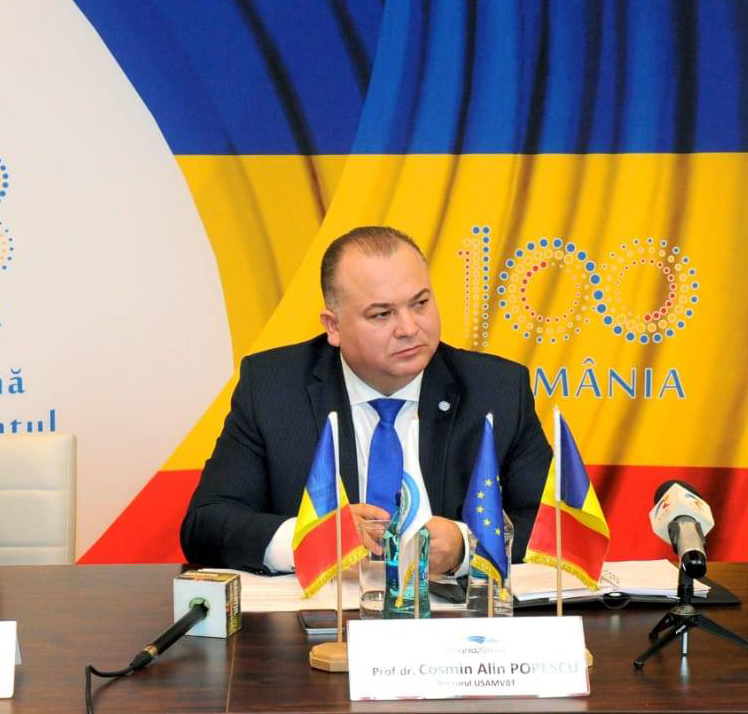 Cosmin Alin Popescu Rektor der USAMVB Timisoara